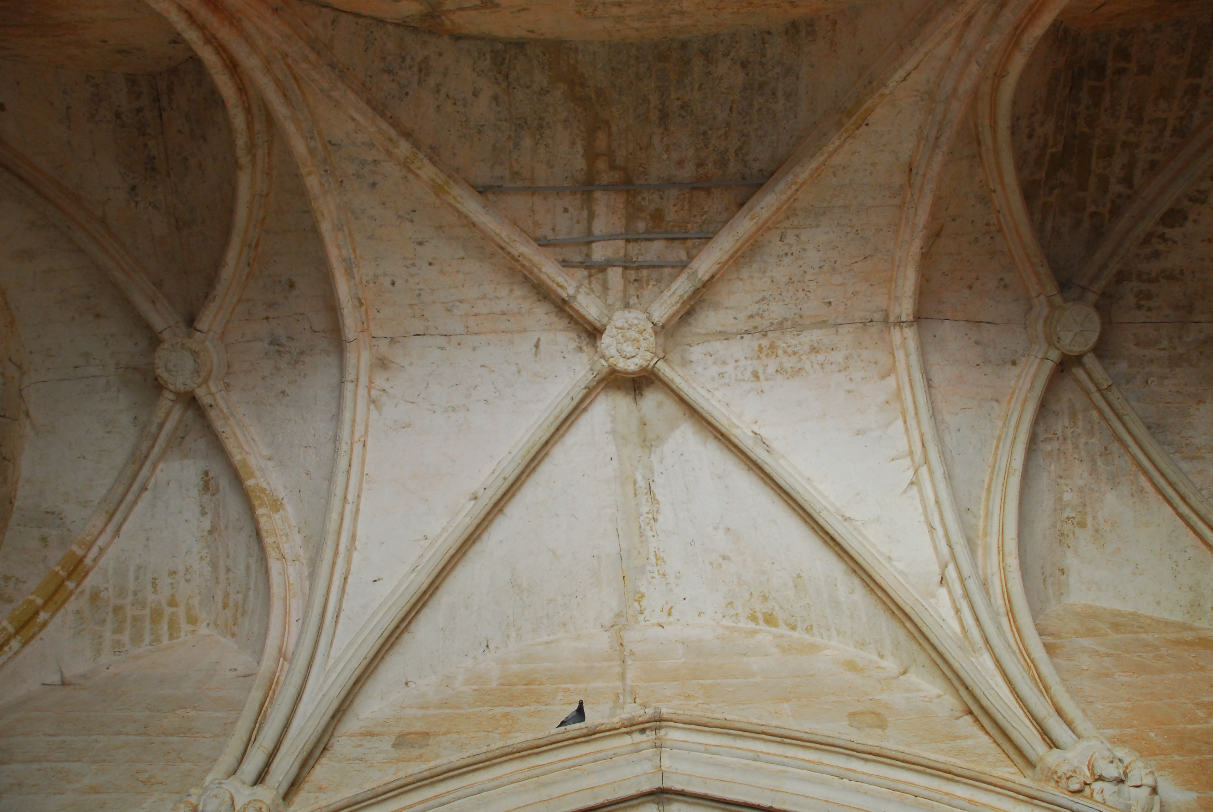 Abbaye de Valmagne, Gewölbe im Narthex